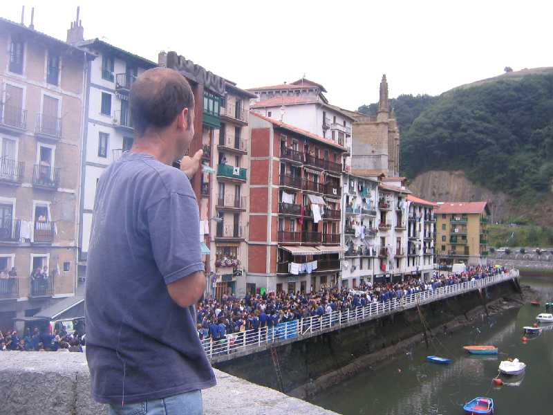 Celebración del Zapatu Azule en Ondarroa.